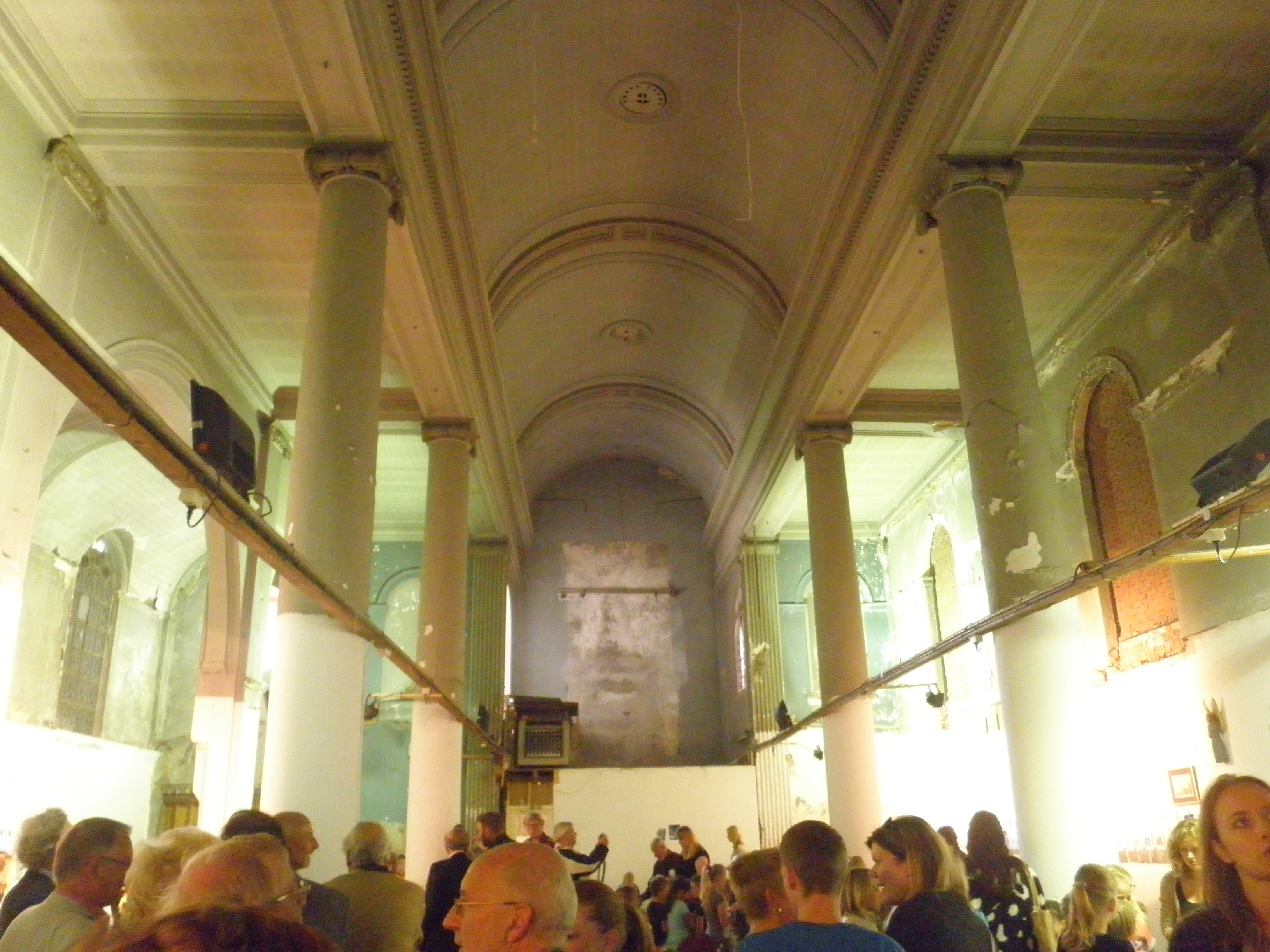 Overzicht van het interieur met helemaal achterin de plek waar het altaar heeft gestaan.